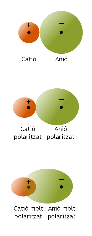 Polarització d'un anió i un catió veïns per la seva interacció.